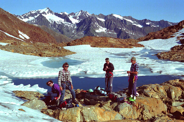 Die Ruderhofspitze (3473 m) in den Stubaier Alpen